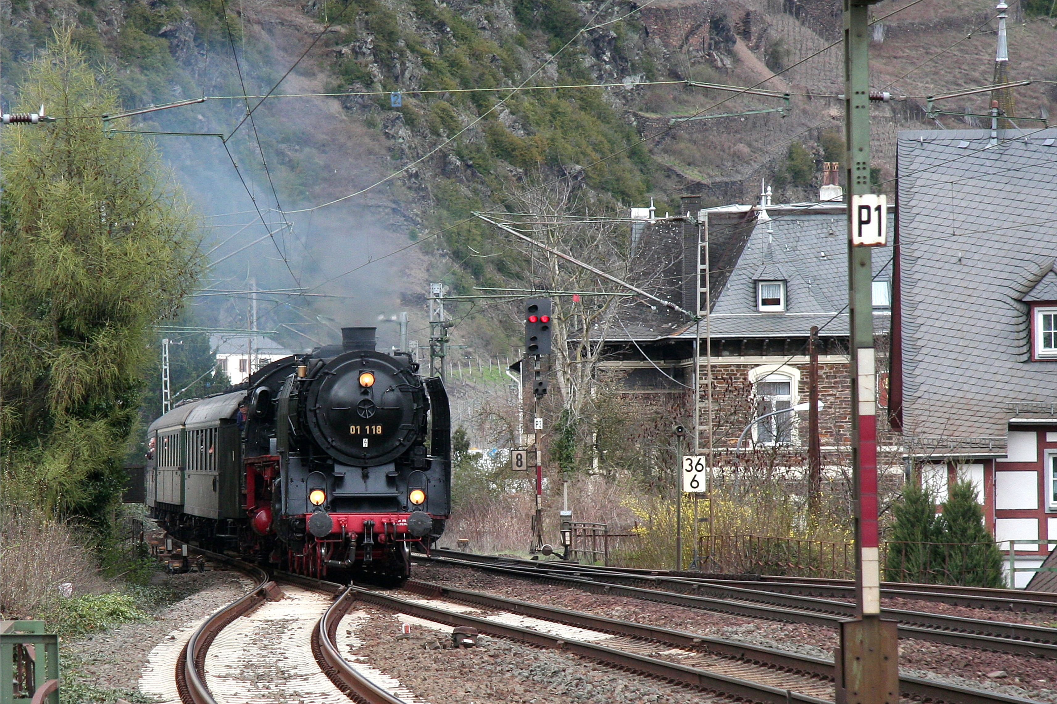 Dampflok 01 118 in Koblenz